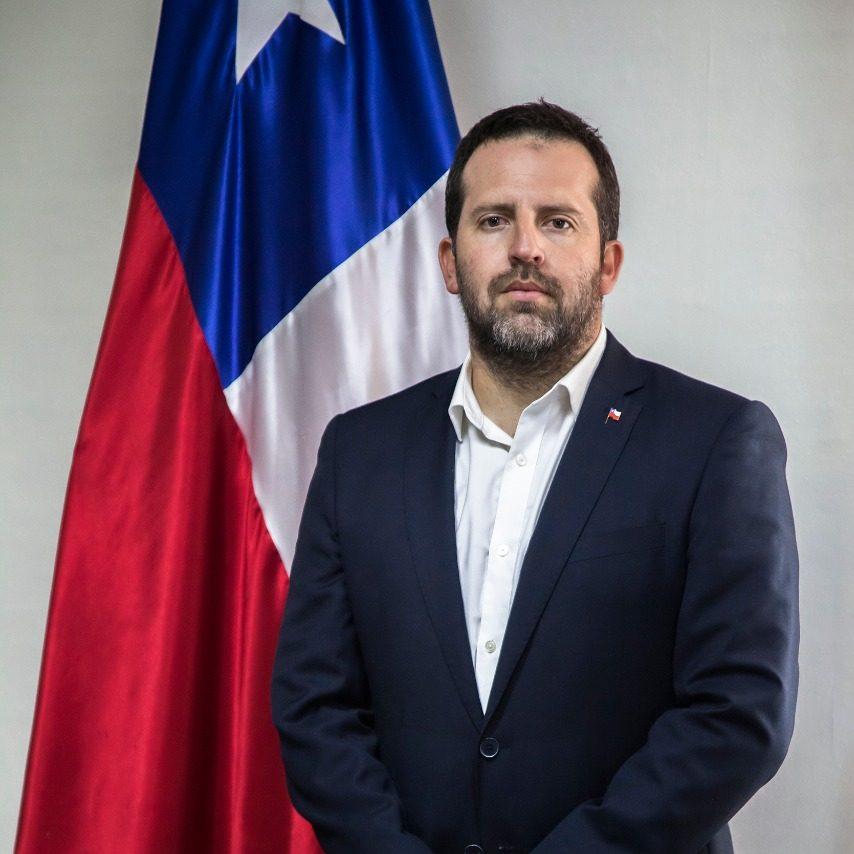 Foto de Edgar Blanco